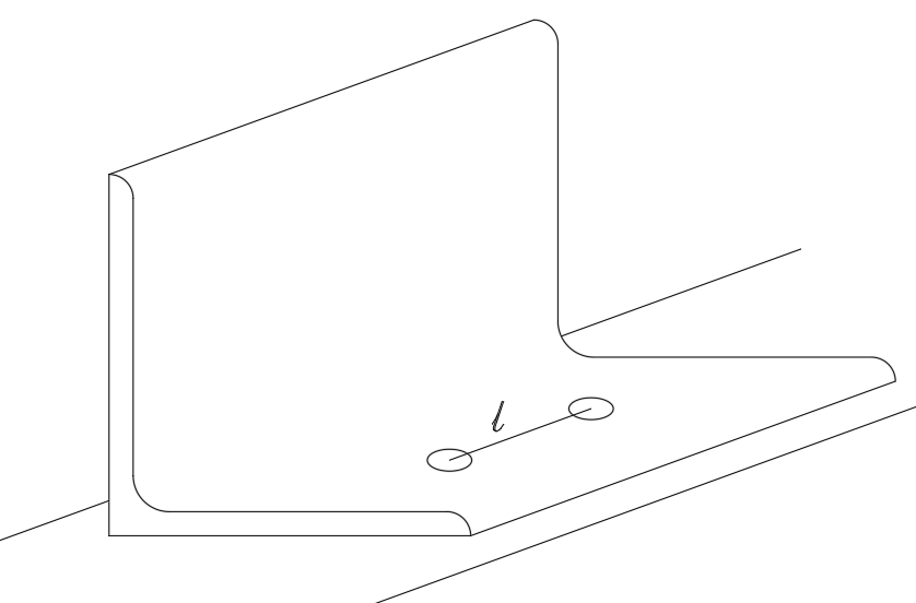 Shear lag